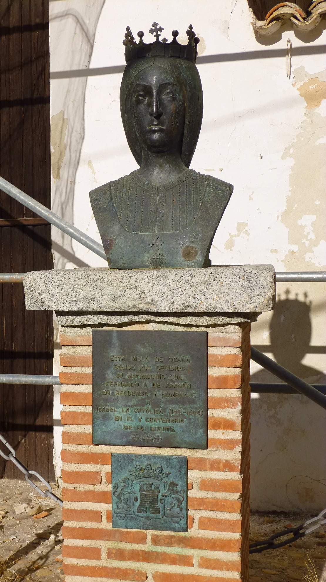 Monumento a Isabel de Castilla en Ocaña (Toledo)